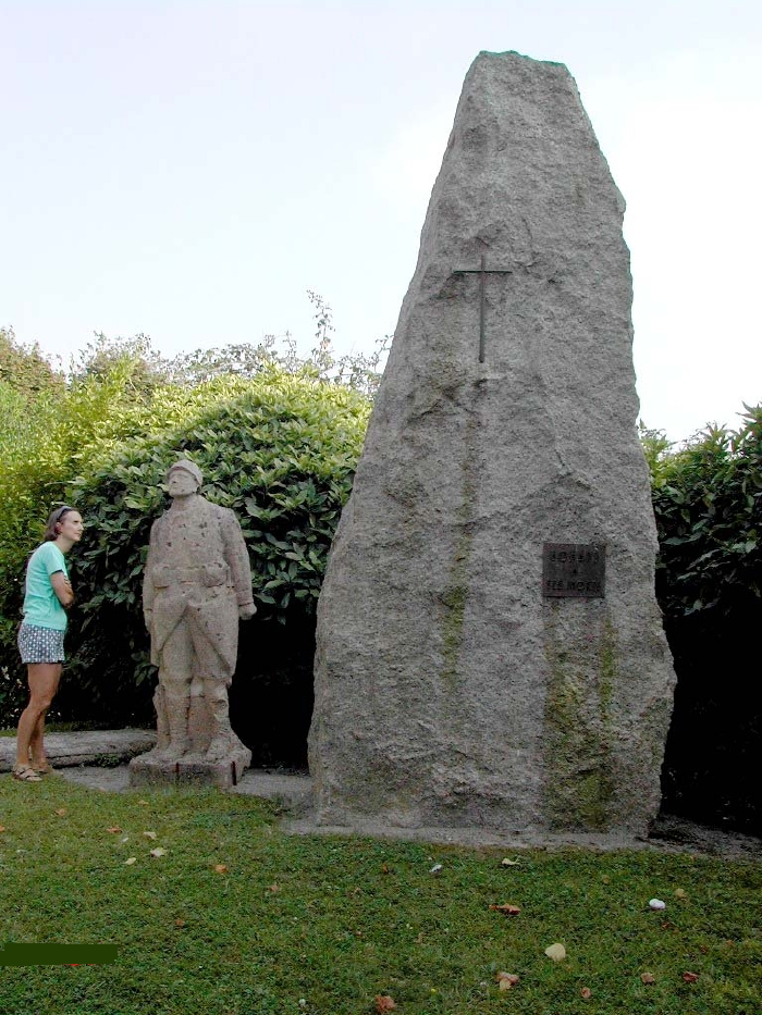 Monument aux morts - Bohars-29